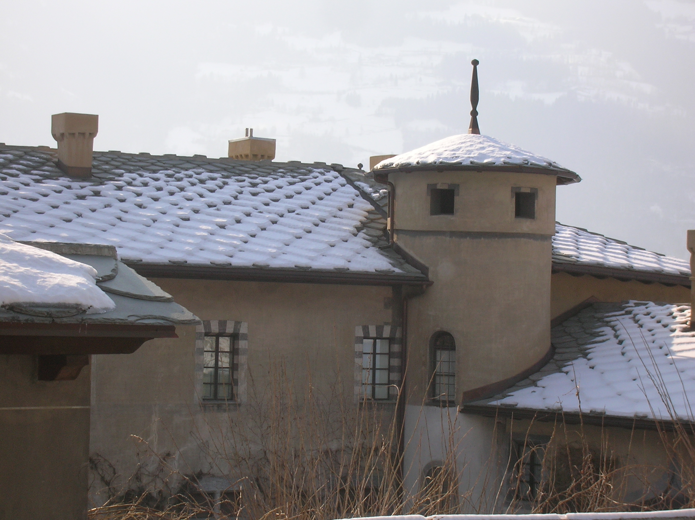 Castello Passerin d'Entrèves a Saint-Christophe, Valle d'Aosta, Italia.